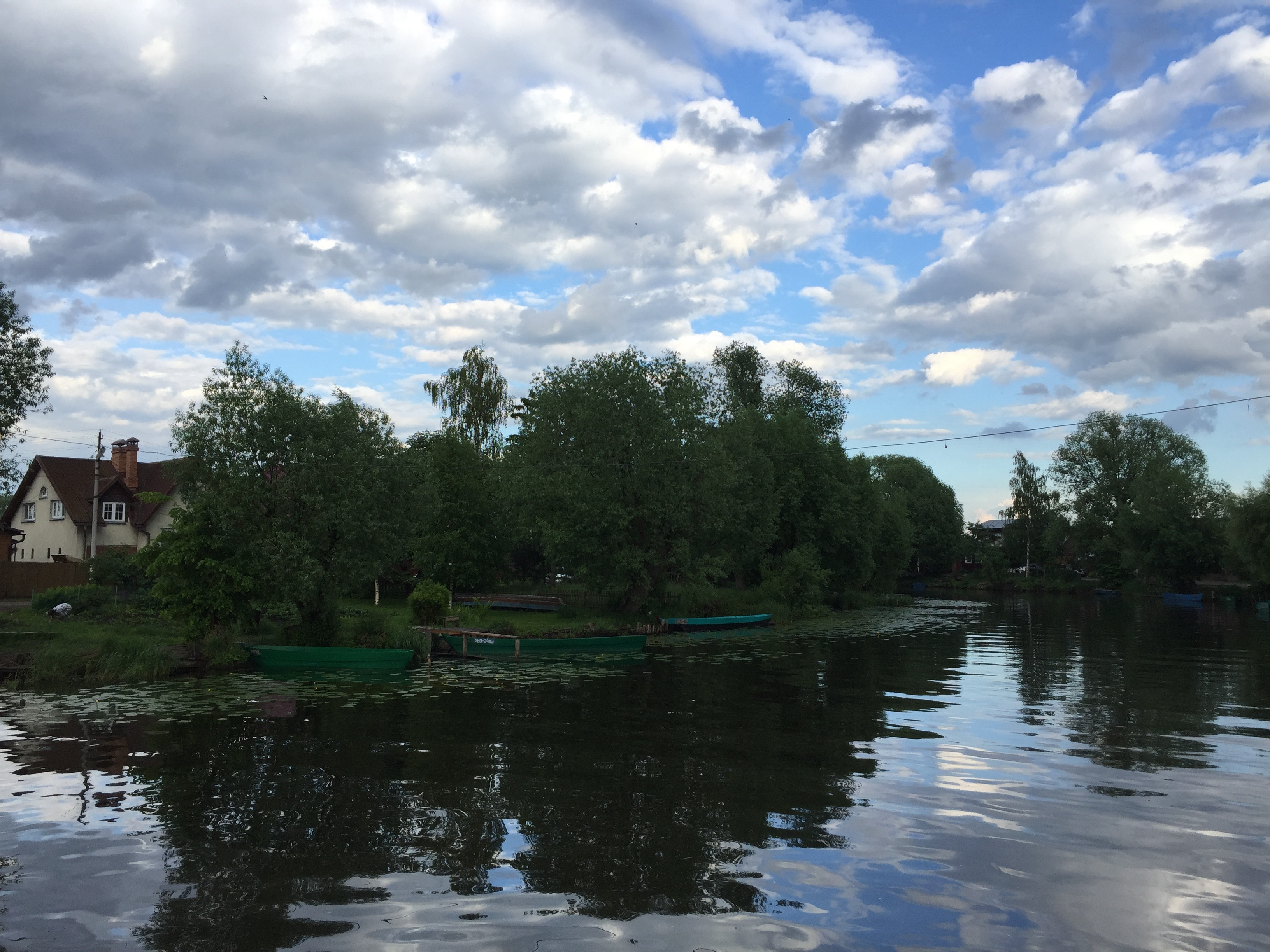 Дома у озера (2019)